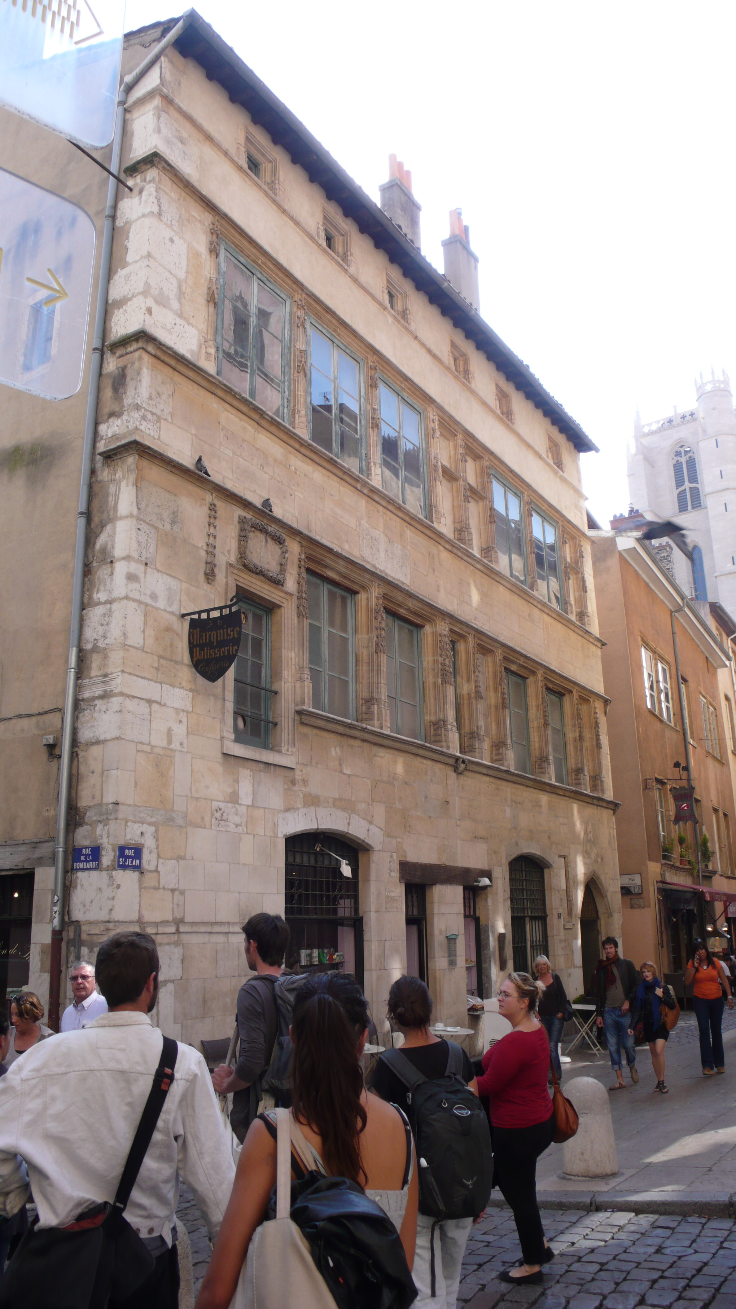 Maison du Chamarier (l'hôtel de la Chamarerie) - 37 rue Saint-Jean - Lyon .